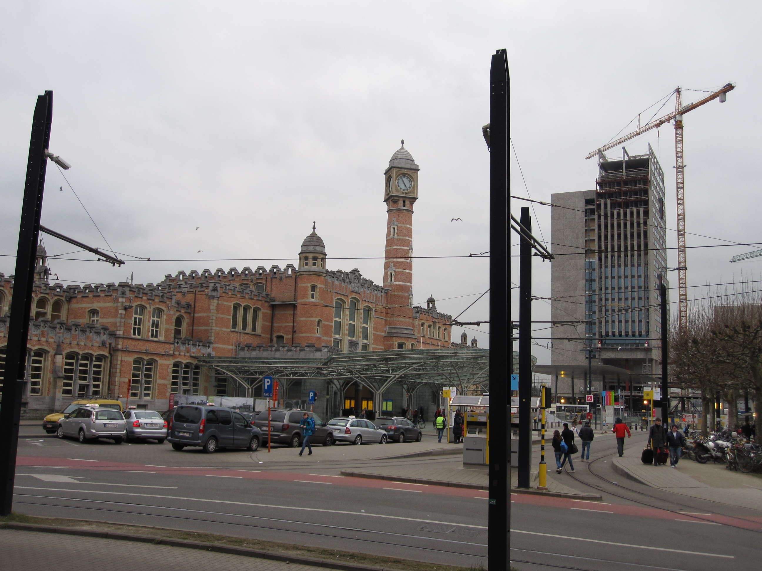 Zijaanzicht stationsgebouw Gent-Sint-Pieters, nieuwe busstation en ontwikkeling aan de Fabiolalaan: het Virginie Lovelinggebouw